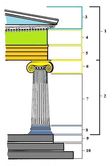 İonik order: 1 - antablement 2 - sütun 3 - karniz 4 - friz 5 - arxitrav 6 - kapitel (abaka və spiral) 7 - gövdə 8 - təməl 9 - stilobat 10 - stereobat